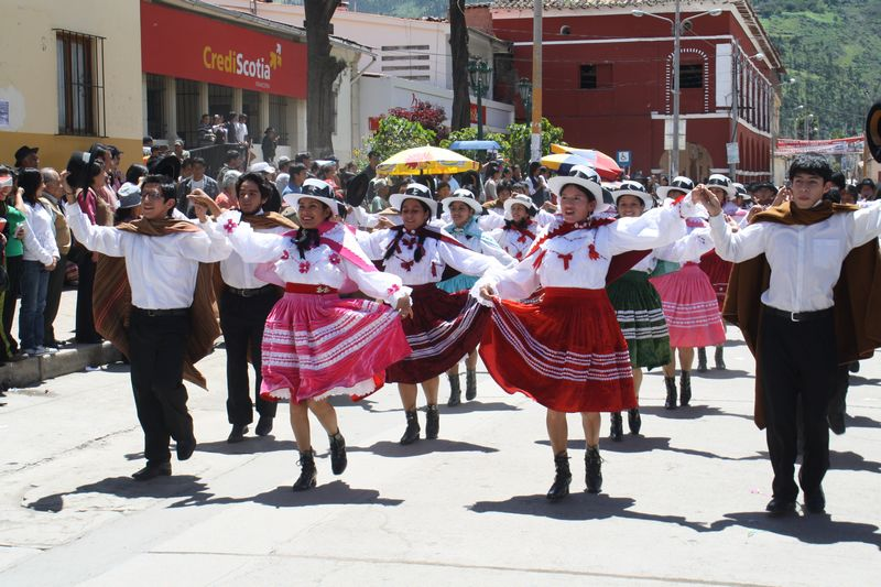 Pasacalle Carnavales Abancay